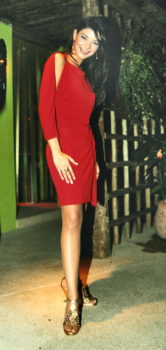 Amanda Françozo depicted person: Amanda Françozo (age: 27.05)